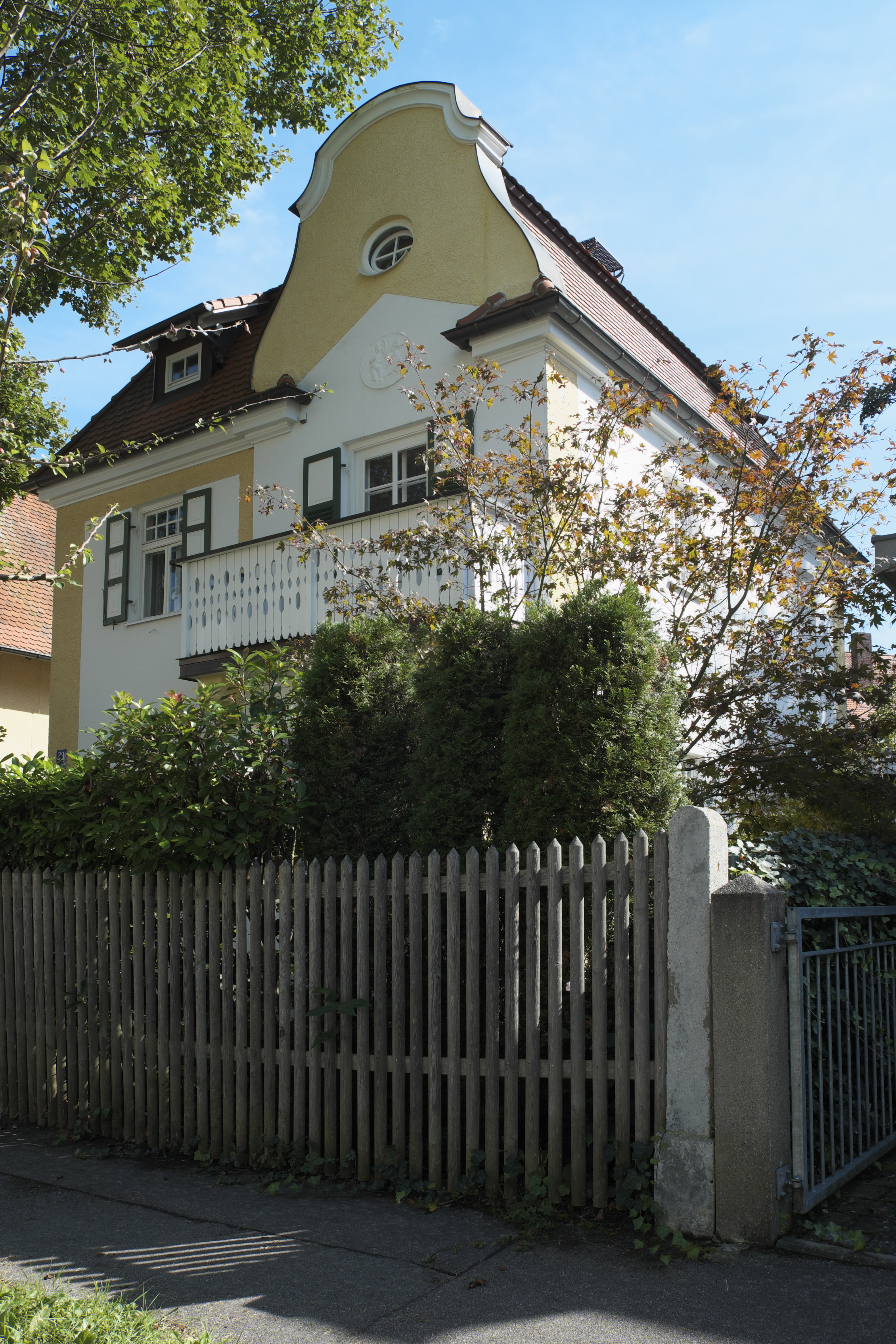 Villa, Apfelallee 23, in Obermenzing im Stadtbezirk Pasing-Obermenzing in München (Bayern/Deutschland), wohl 1902 von Otto Numberger erbaut